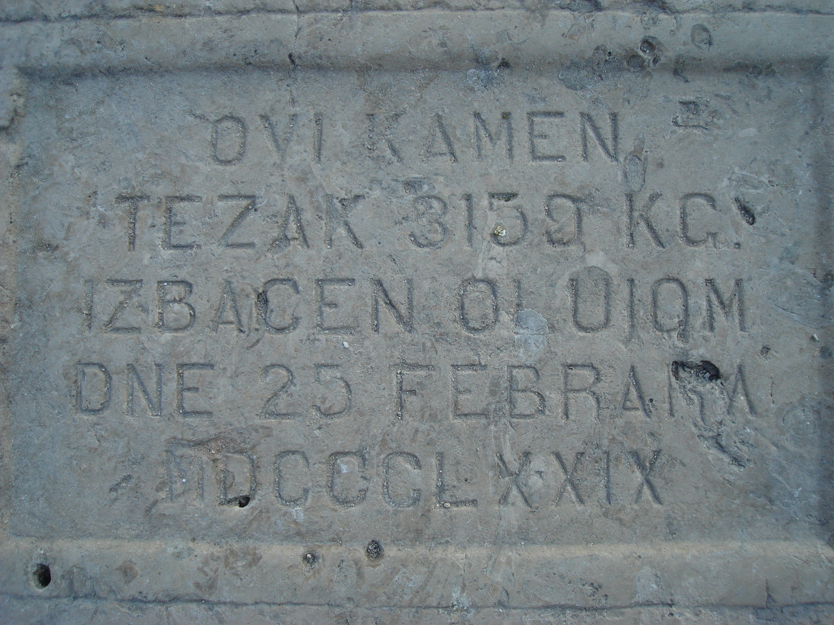 Stijena koju je izbacilo more pa je ugradjena u lukobran Porporela